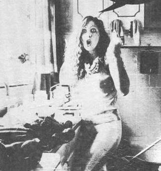 Fotografía de la portada del LP Me vuelvo cada días más loca (Interdisc S.A, 1982)